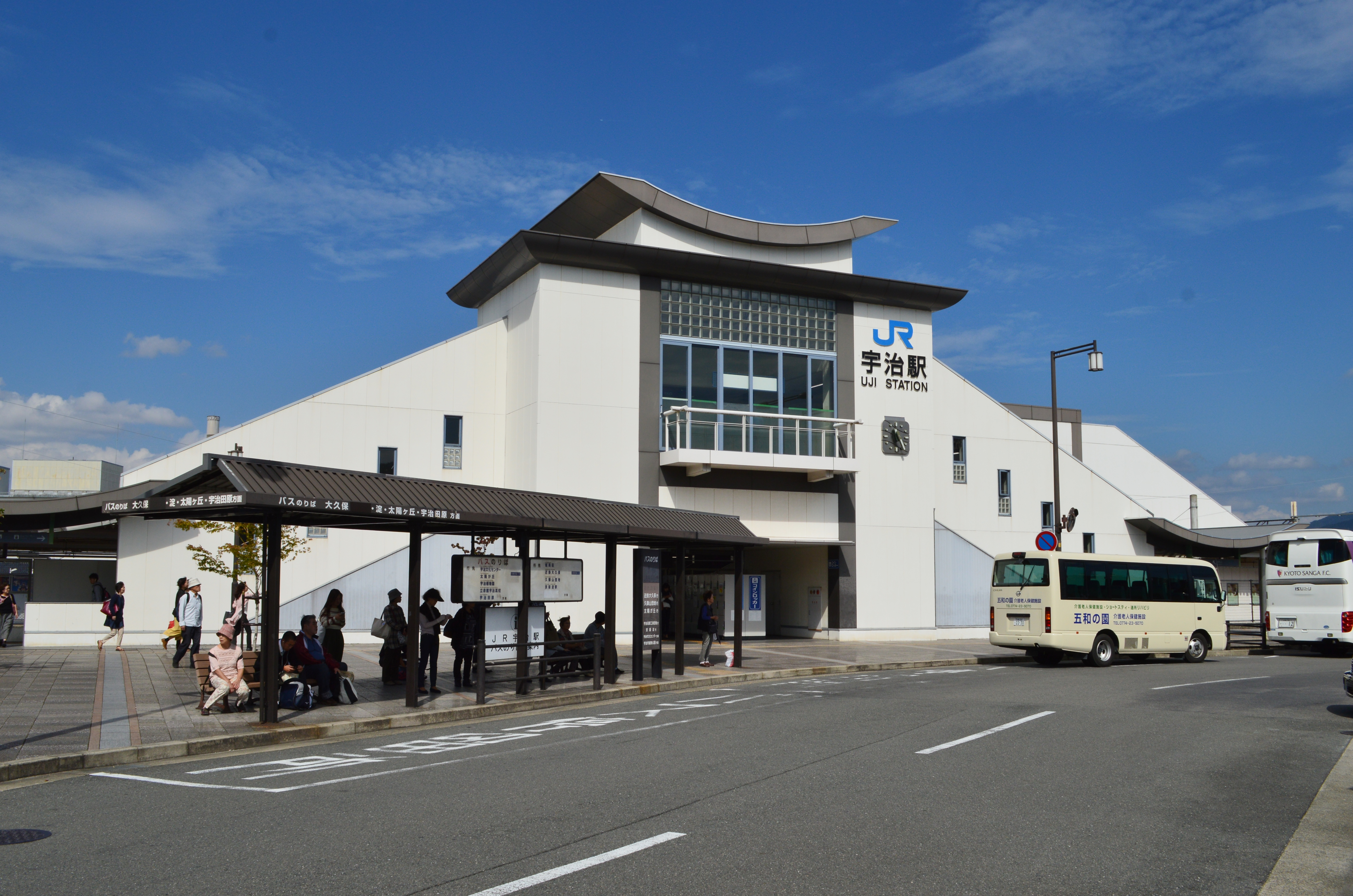 JR宇治駅 駅舎